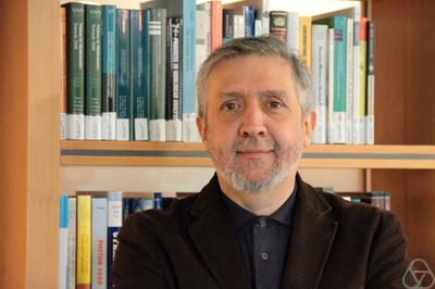 Foto di Umberto Zannier